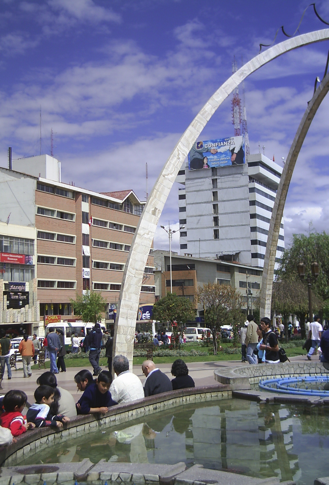 Centro de la ciudad de Huancayo, Junín, Perú